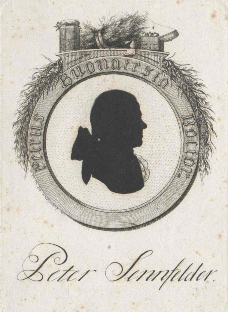 Franz Peter Sennfelder (1744–1792), Vater von Alois Senefelder